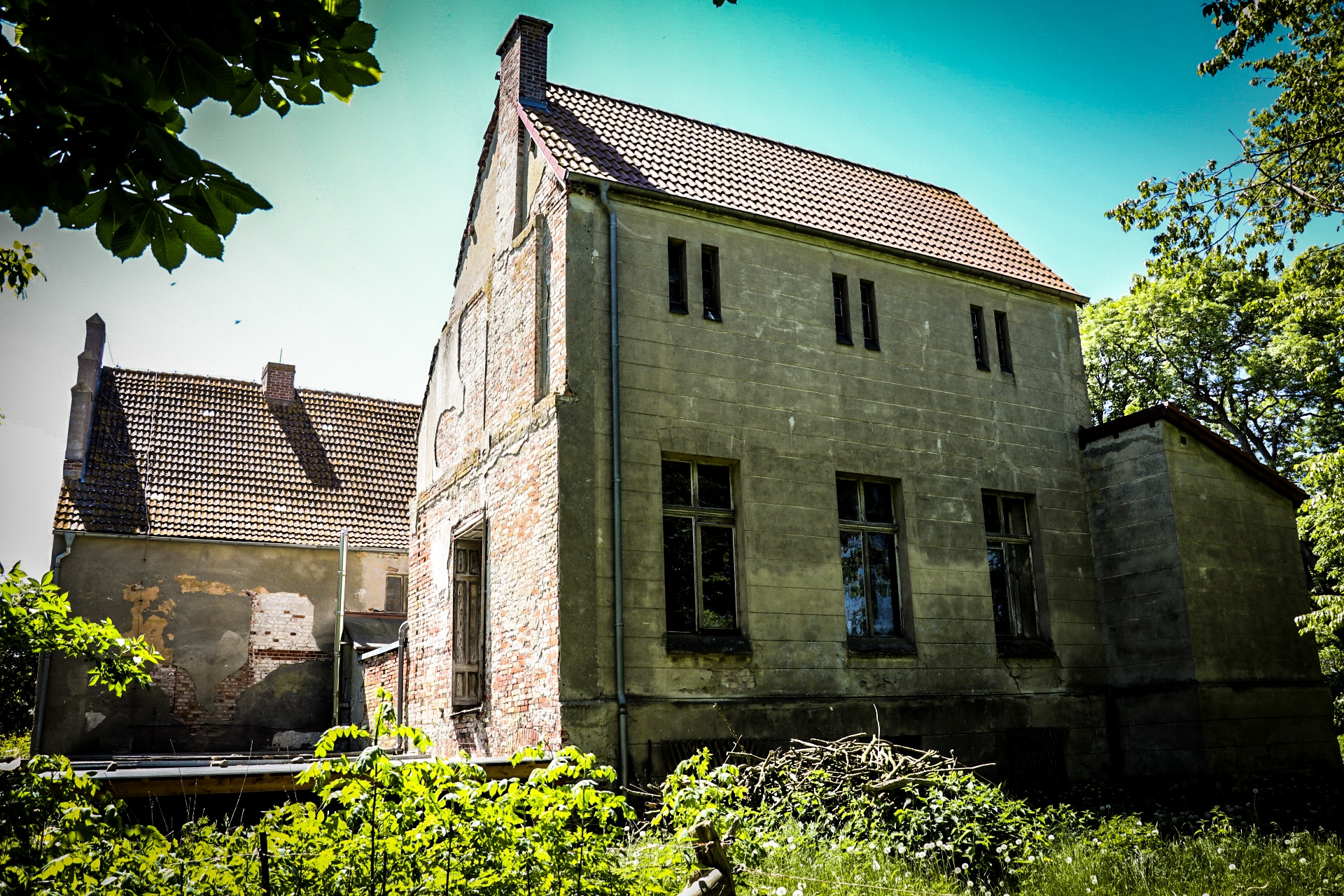 Ralow 2017 von Norden